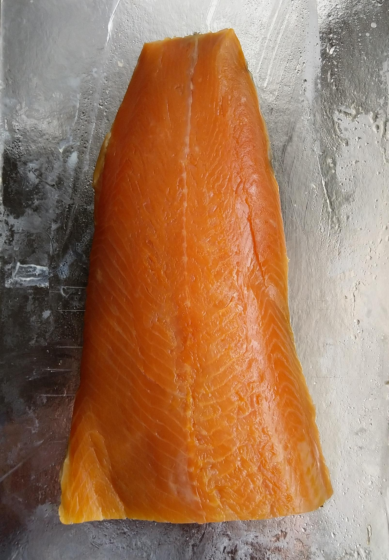 Smoked fillet of Arctic charr